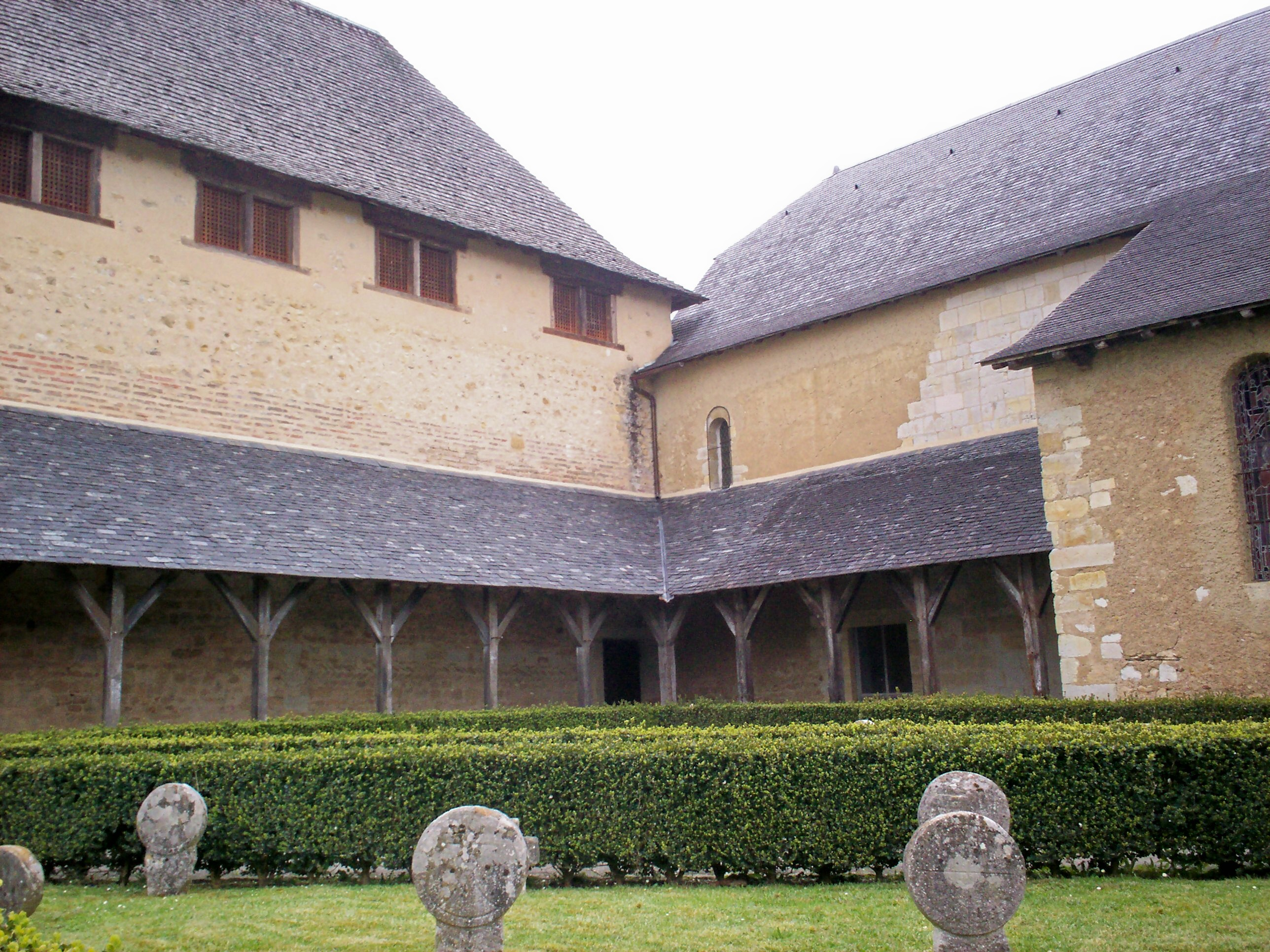 La comandaria dab tombas discoídalas